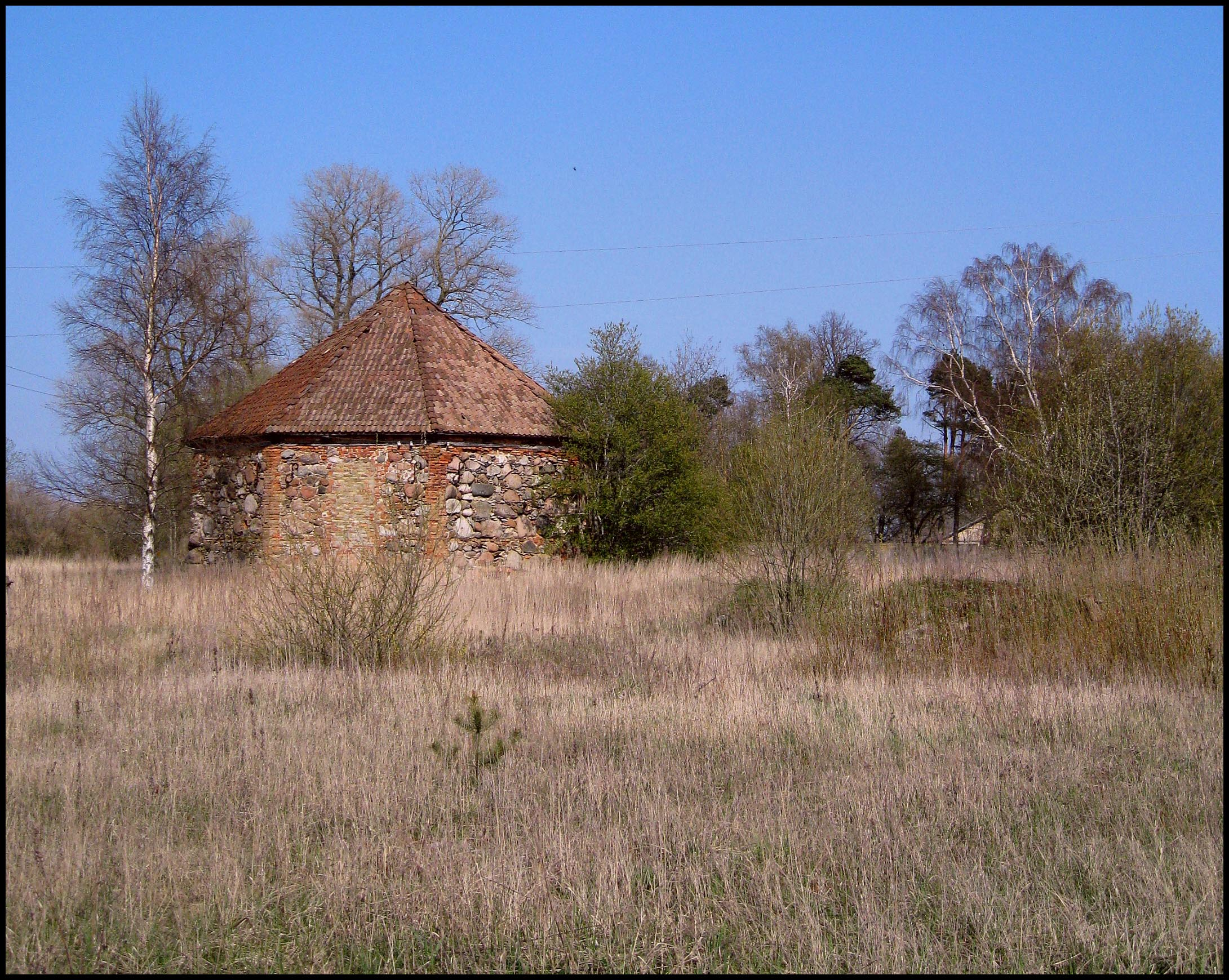 Vārves vējdzirnavas / former windmill